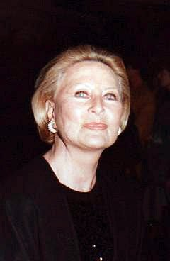 Michèle Morgan à la cérémonie des César